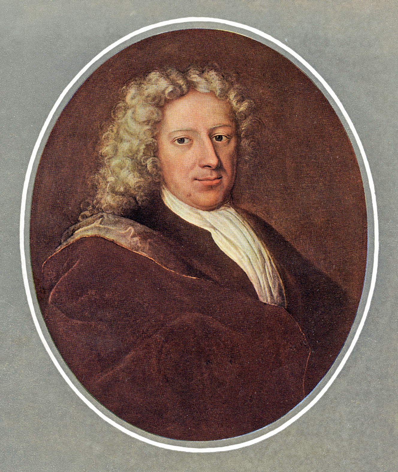 Porträt von Johann Jakob Kees, d. Ä., um 1700